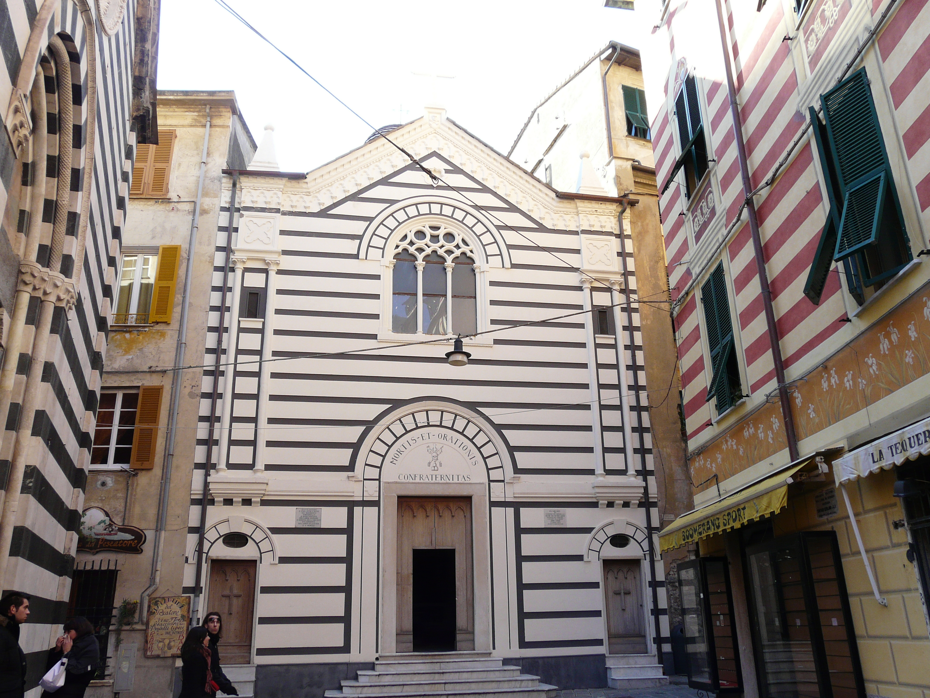 Oratorio dei Neri, Monterosso al Mare, Cinque Terre, La Spezia, Liguria, Italia